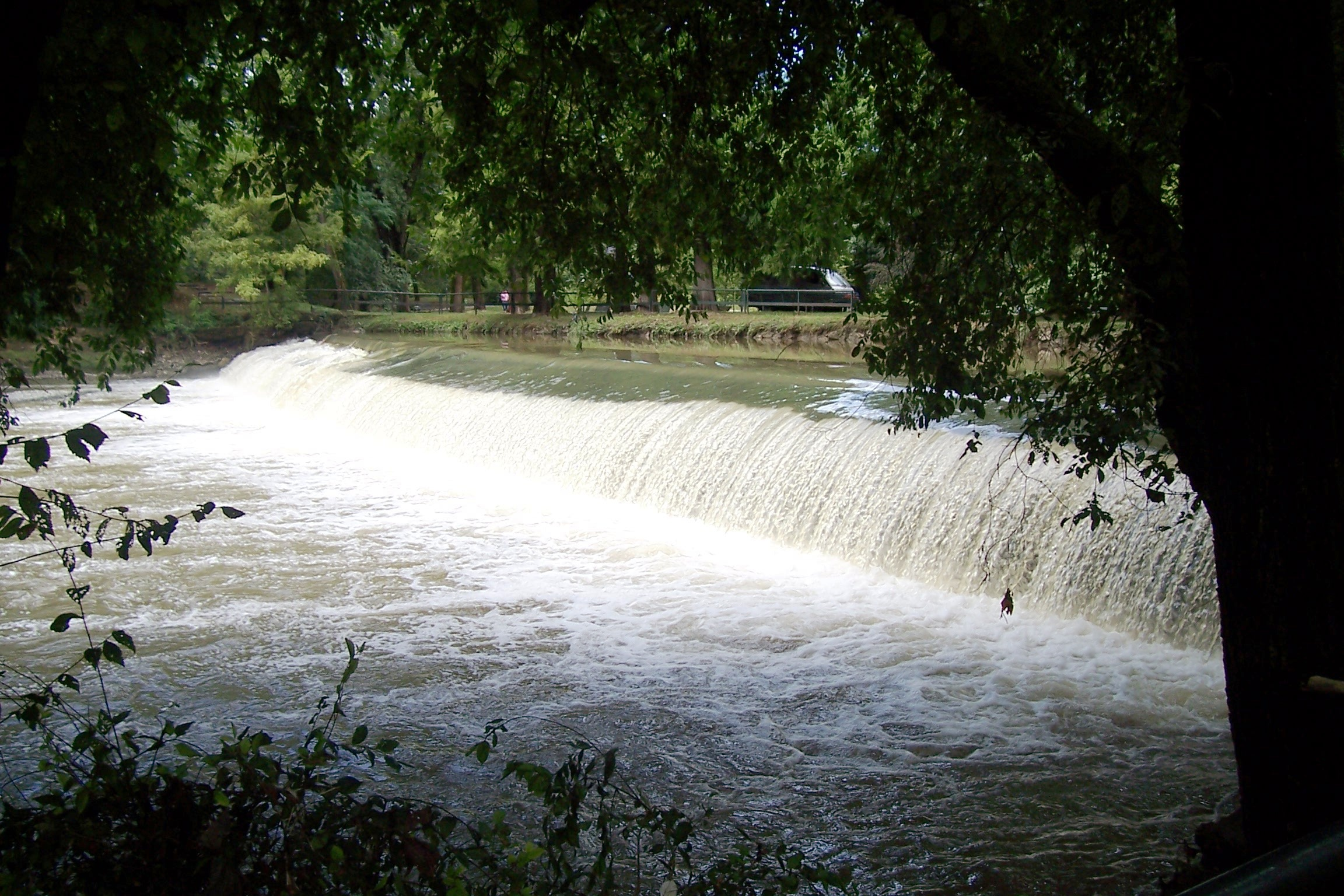 Milano, Lambro falls in Lambro park